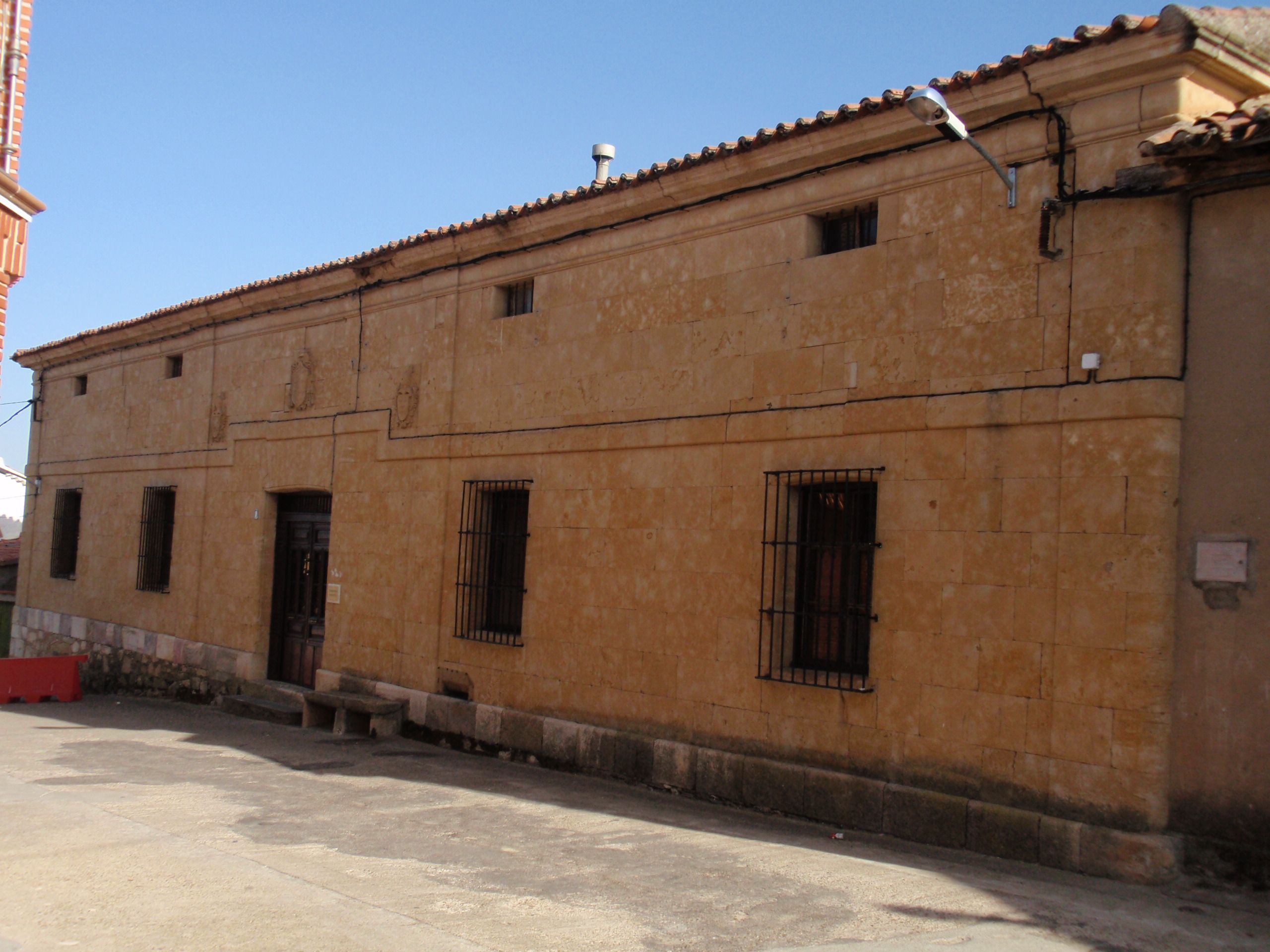 Palacio del Obispo de Luelmo y Pinto en la Calle el Cortinal de Morales del Vino (Zamora). Siglo XVIII, piedra mollar (arenisca de Villamayor)